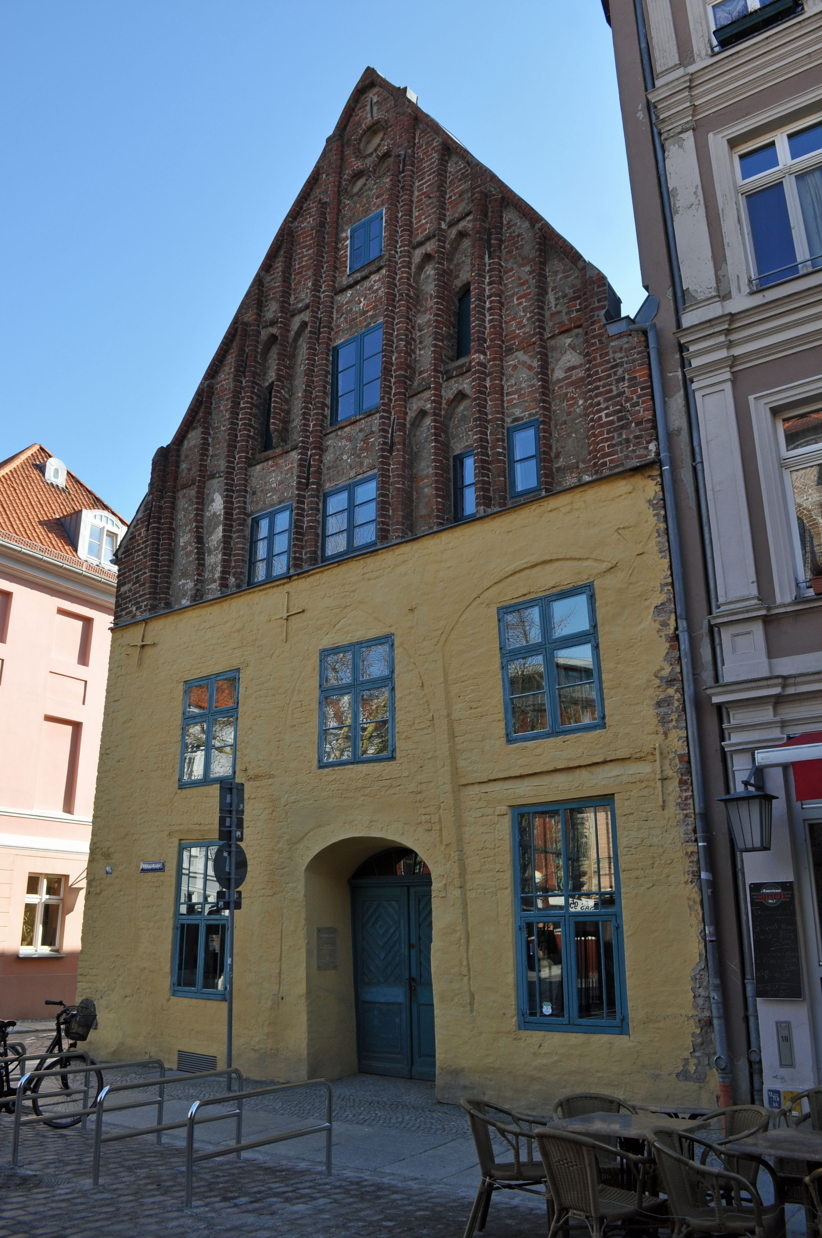 Gebäude bzw. Gebäudedetail in Stralsund. Straße und Hausnummer siehe Dateiname.